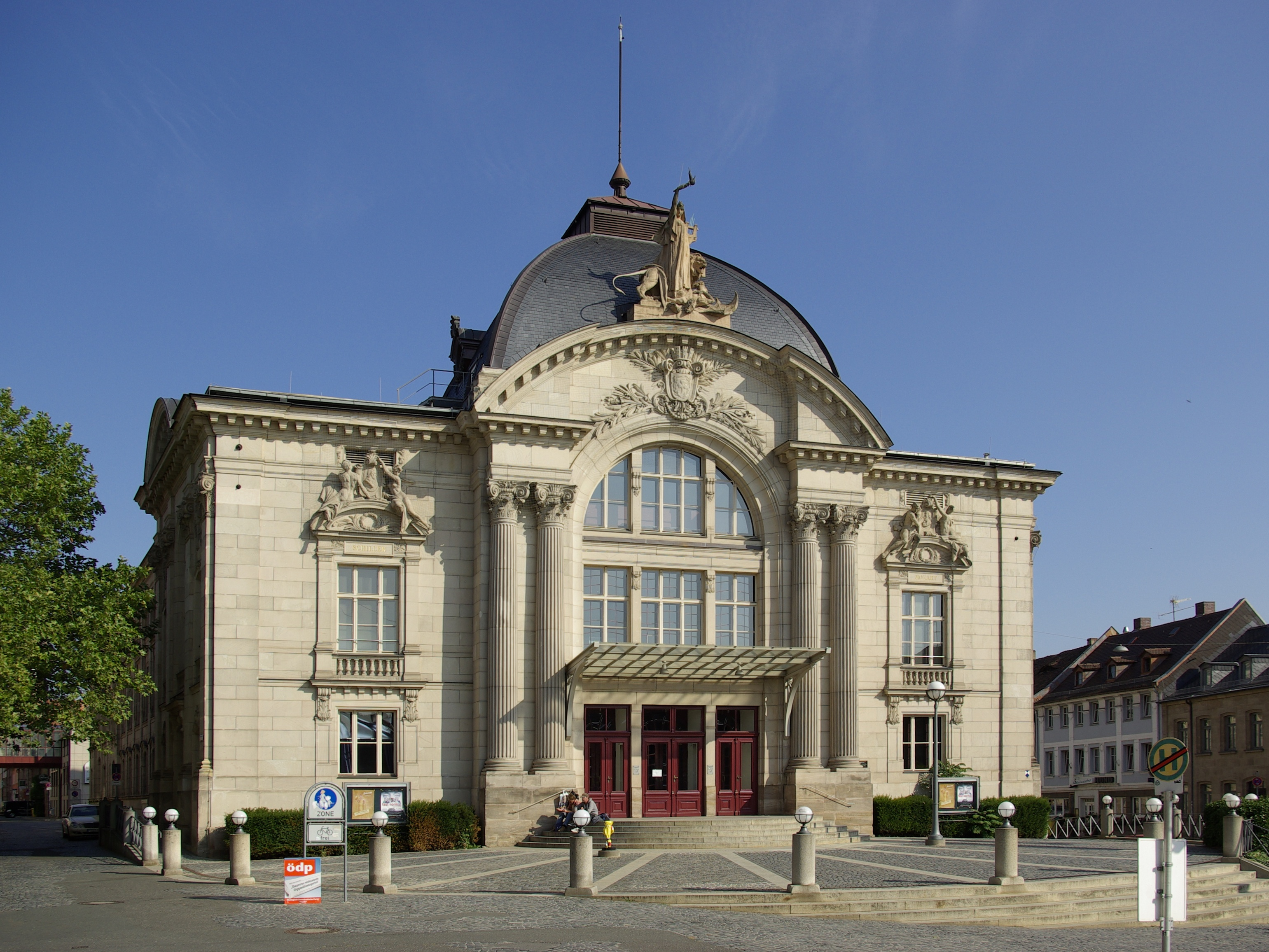 Stadttheater Fürth